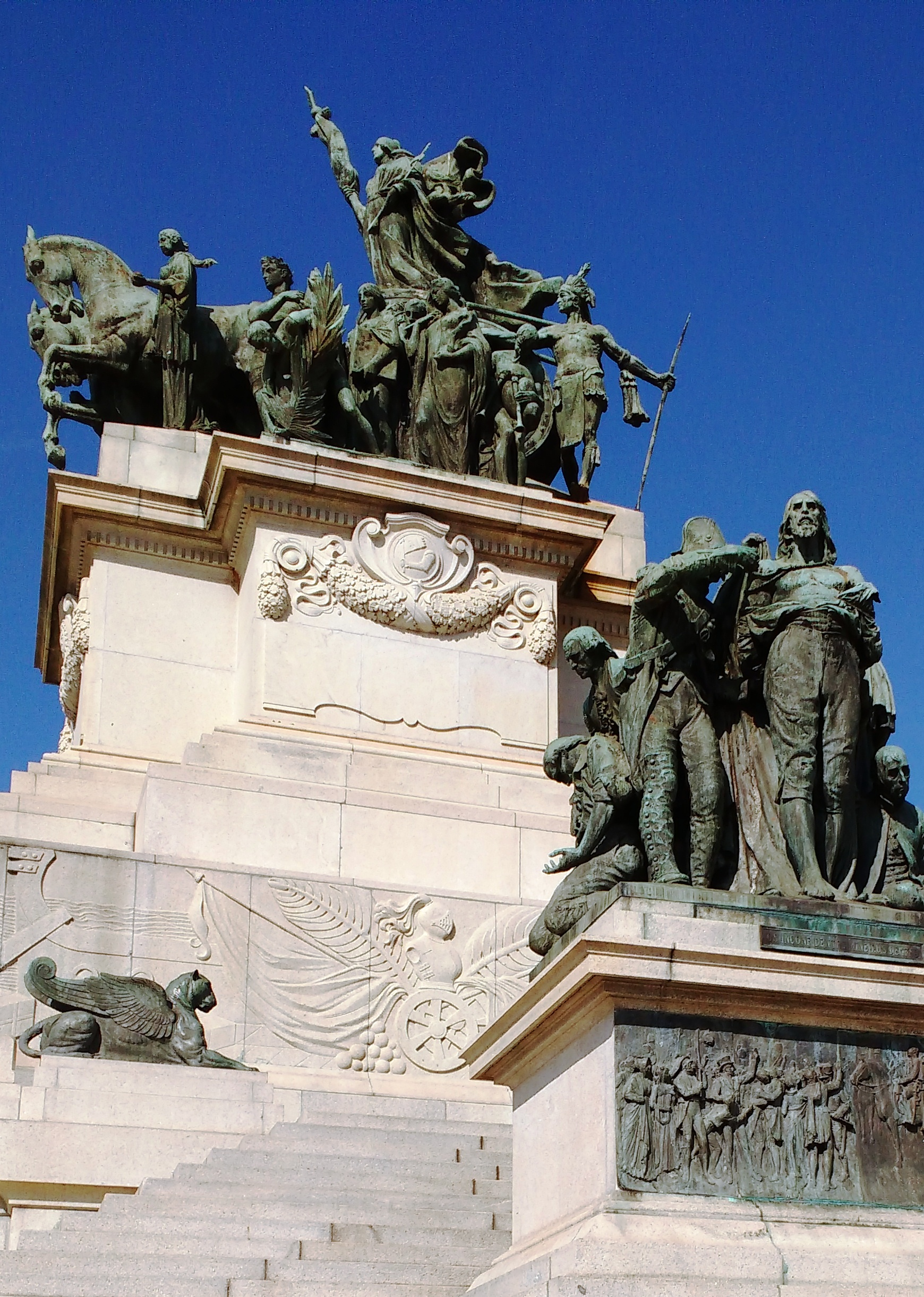 Conjunto do Ipiranga: Museu Paulista, Monumento à Independência, Casa do Grito e Parque da Independência